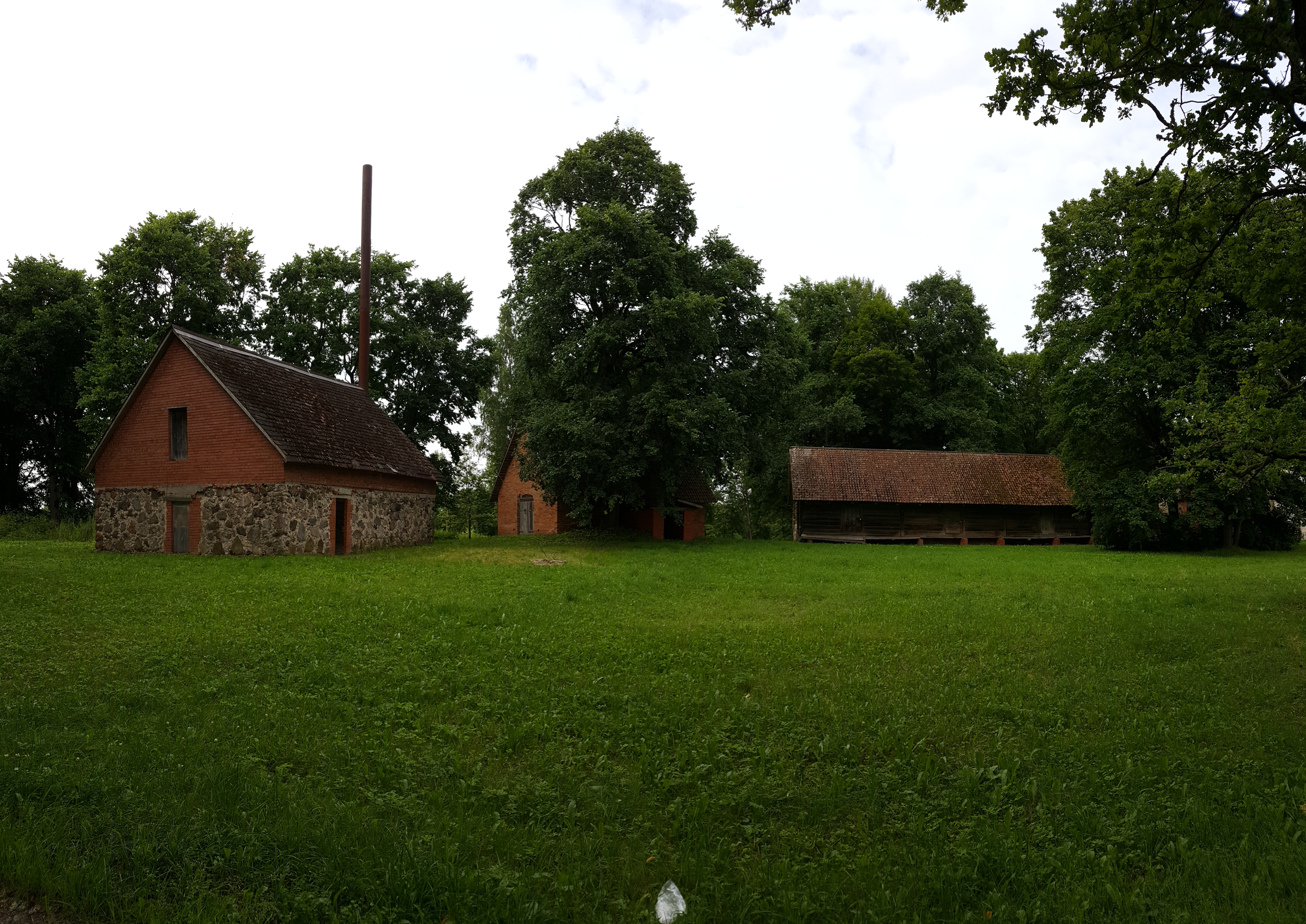 Vērene mõisa kõrvalhooned